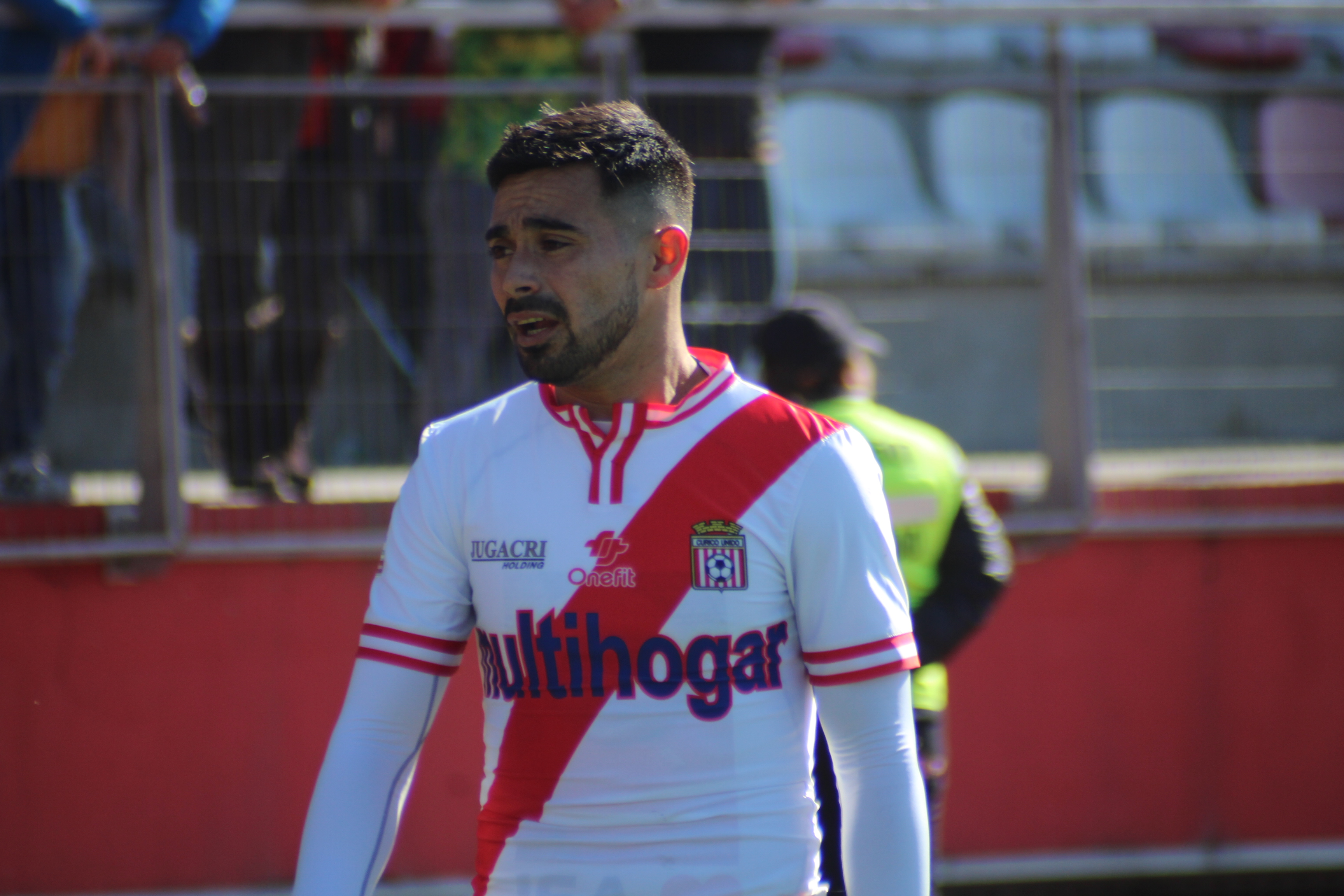 Ricardo Blanco Curico Unido 2018 Foto: Allan Navarro Duran